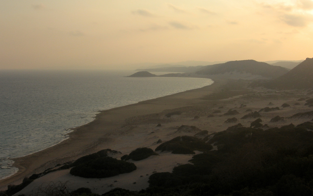 Golden beach at sunset, Karpass Peninsula